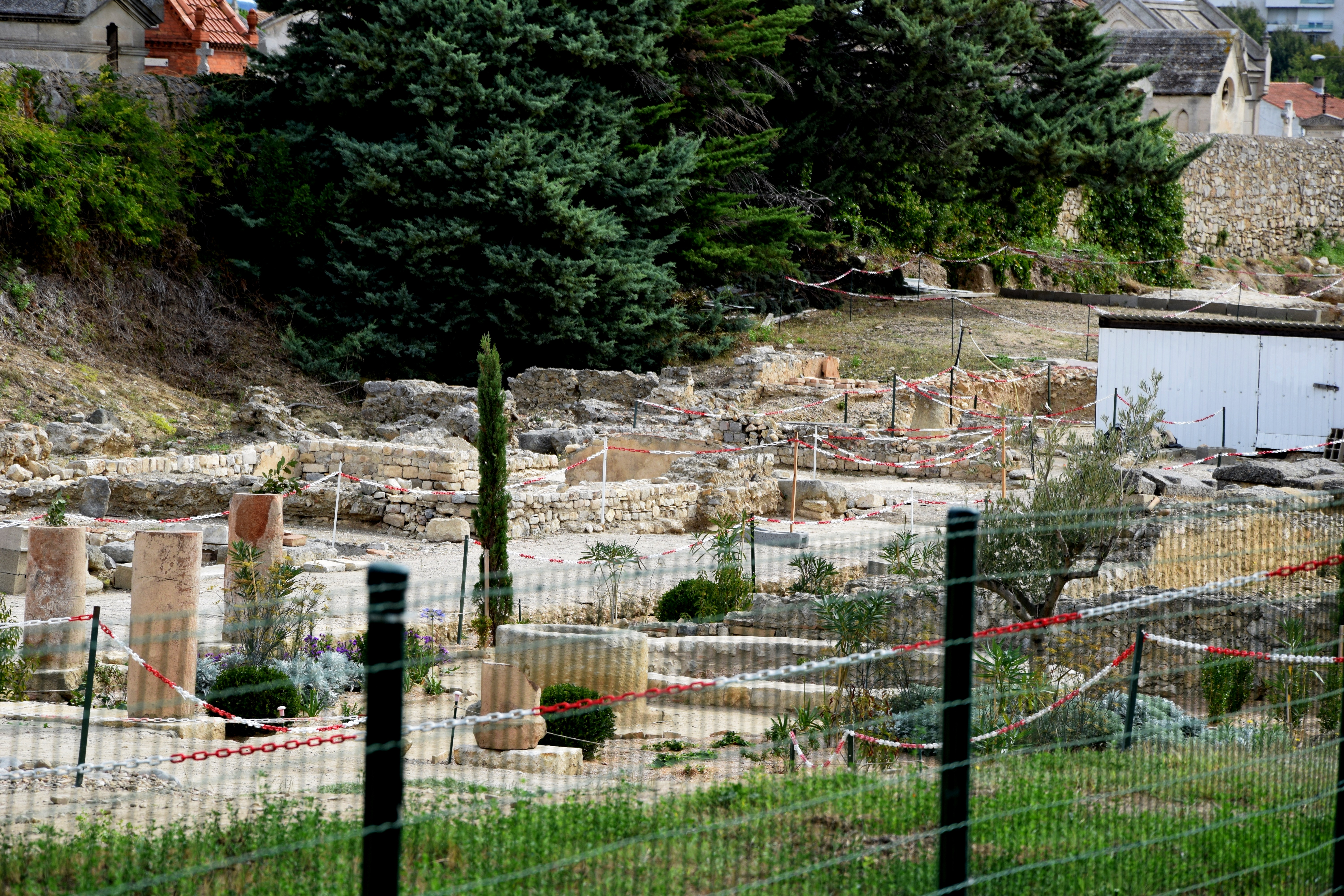 Vestiges archéologiques du Clos de la Lombarde, Narbonne .